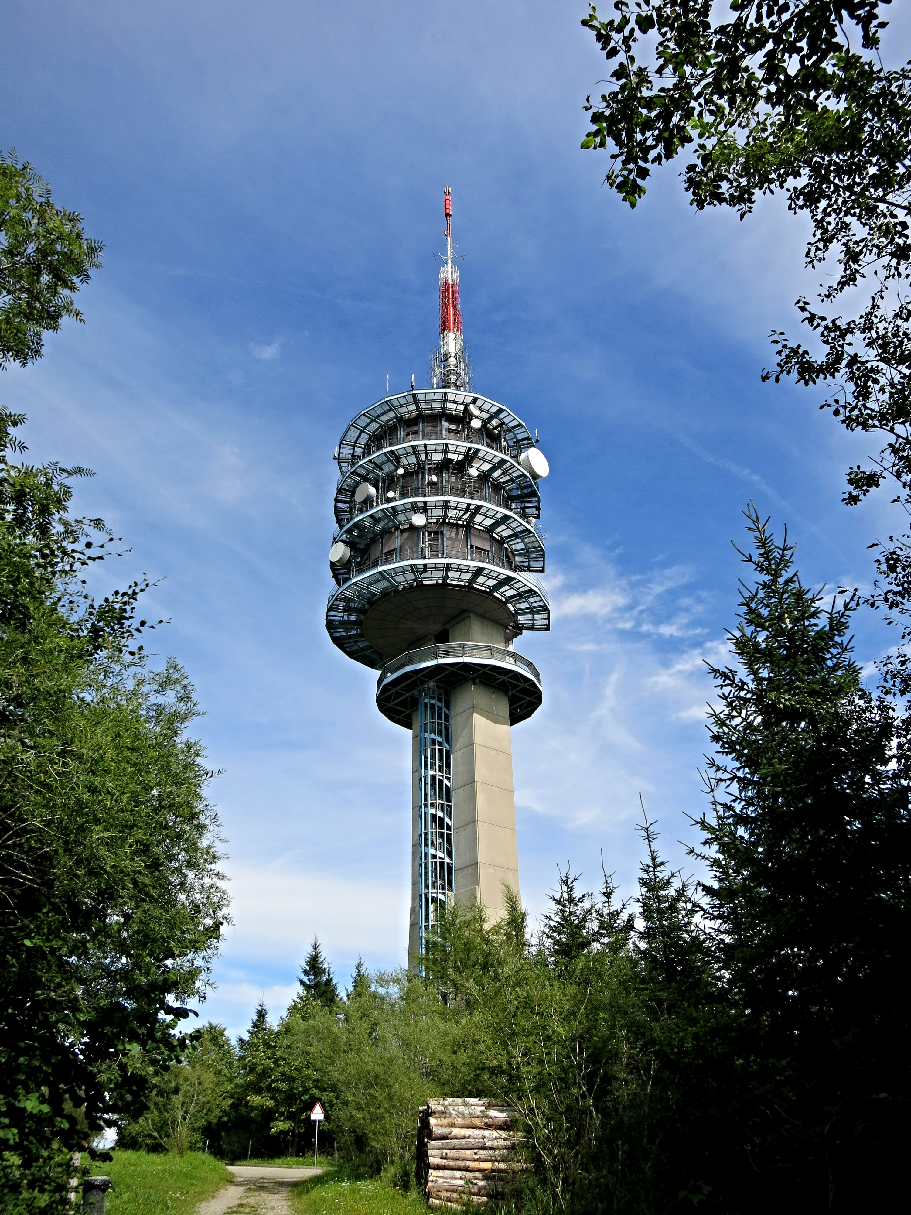 Mont_Gibloux_Sendeturm